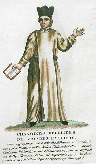 Collection de costumes de tous les ordres monastiques, supprimés à differentes époques, dans la ci-devant Belgique, Bruxelles, Philippe Joseph Maillart et sœur, 1811